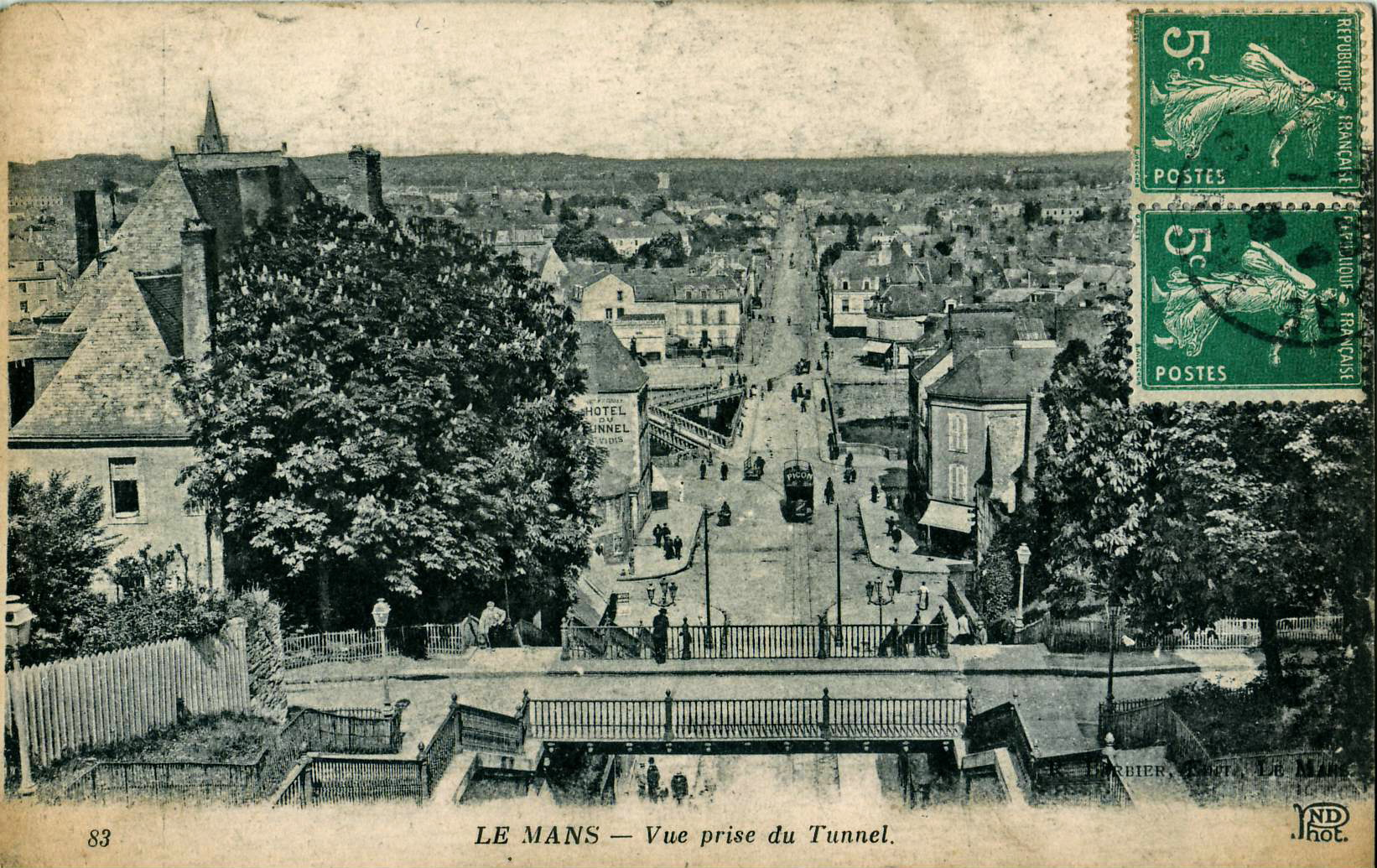 Carte postale ancienne éditée par ND, n°83 :LE MANS - Vue prise du Tunnel